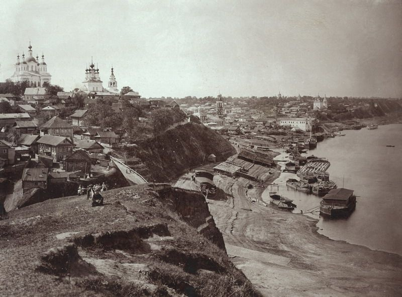 Россия. Павлово-на-Оке (ныне г.Павлово, Нижегородская обл.). Вид с Троицкой горы. кон.XIX-нач.XX века.